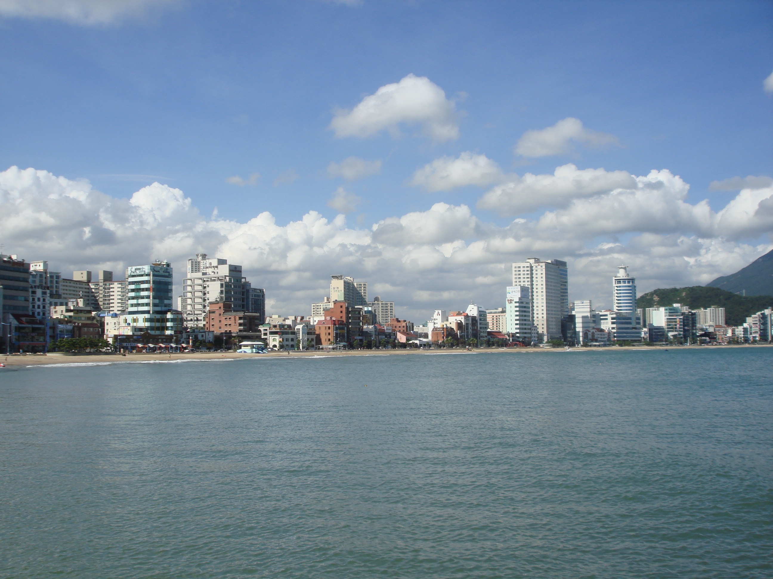 Gwanganli Beach in Suyeong-gu, Busan, South Korea.